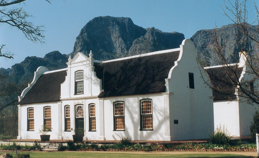 Manoir viticole de Rhone, domaine de Boschendal, province du Cap-Occidental